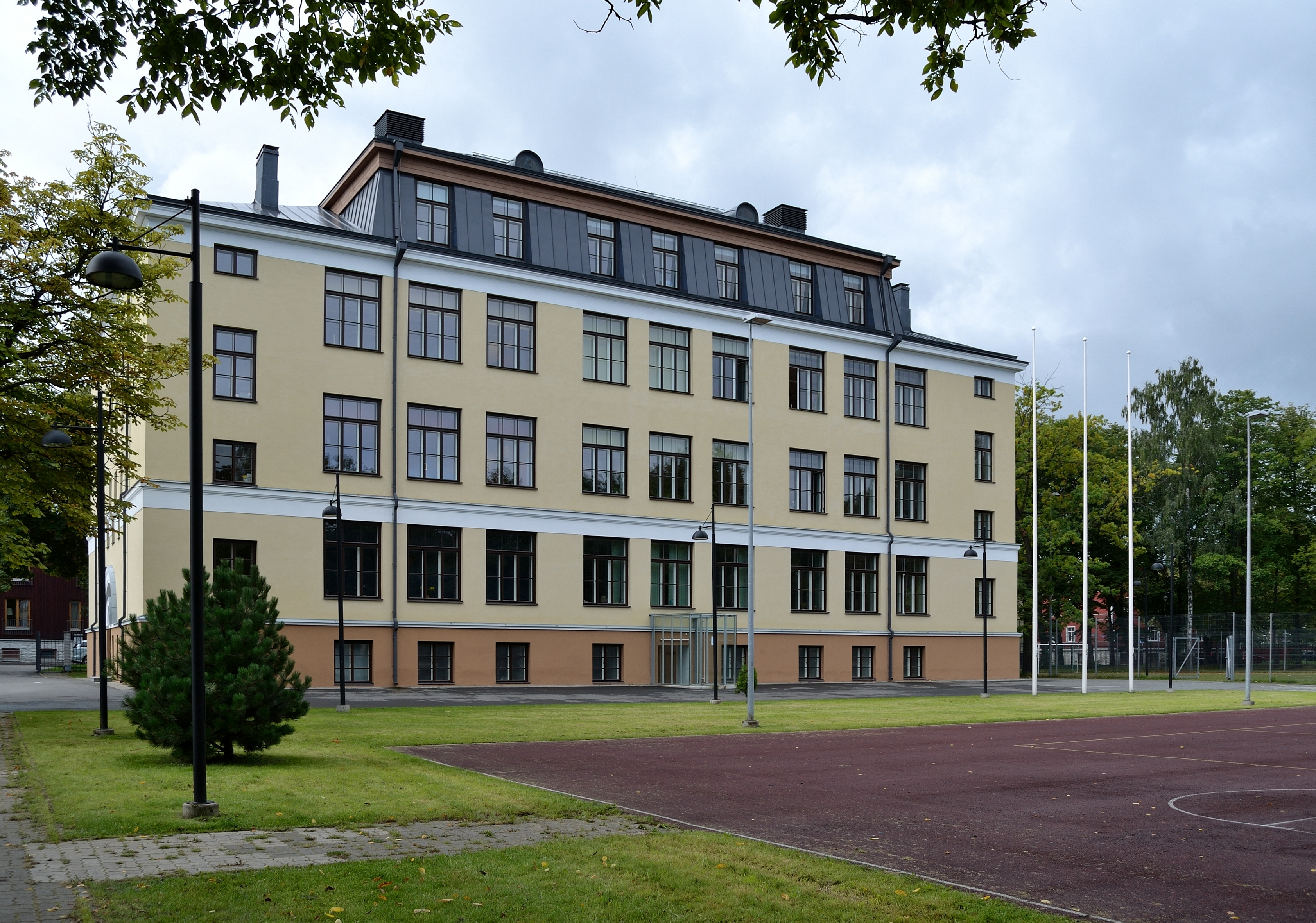 Tallinn, koolihoone Vabriku 18, 1913